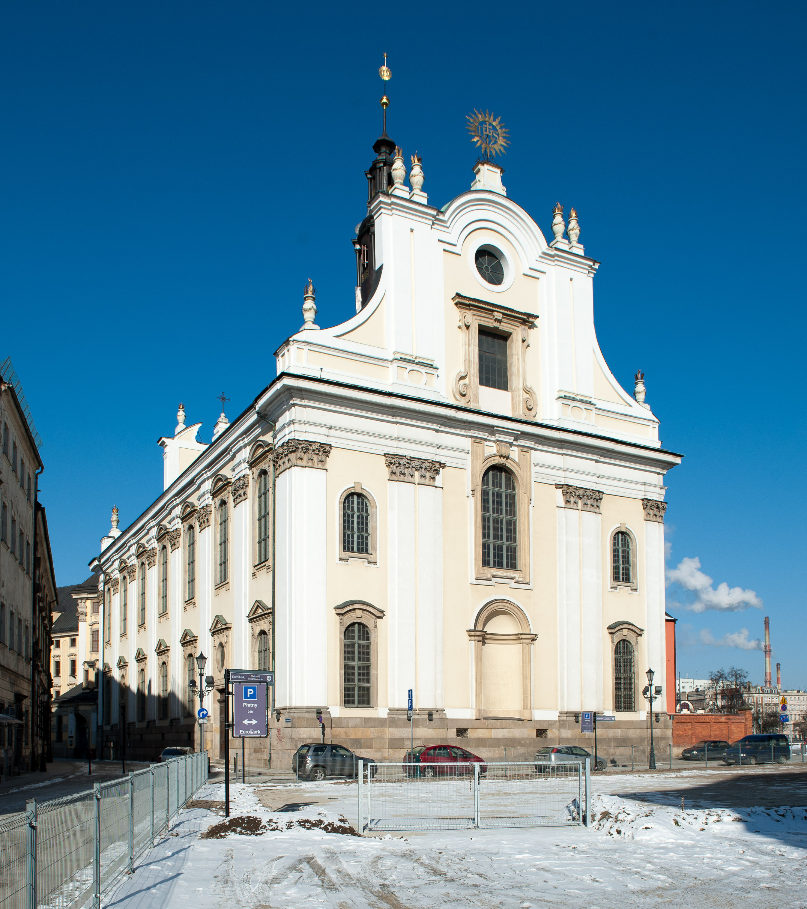 Kościół parafialny Najświętszego Imienia Jezus (Uniwersytecki) oo. jezuitów pl. Uniwersytecki 1a, Wrocław.